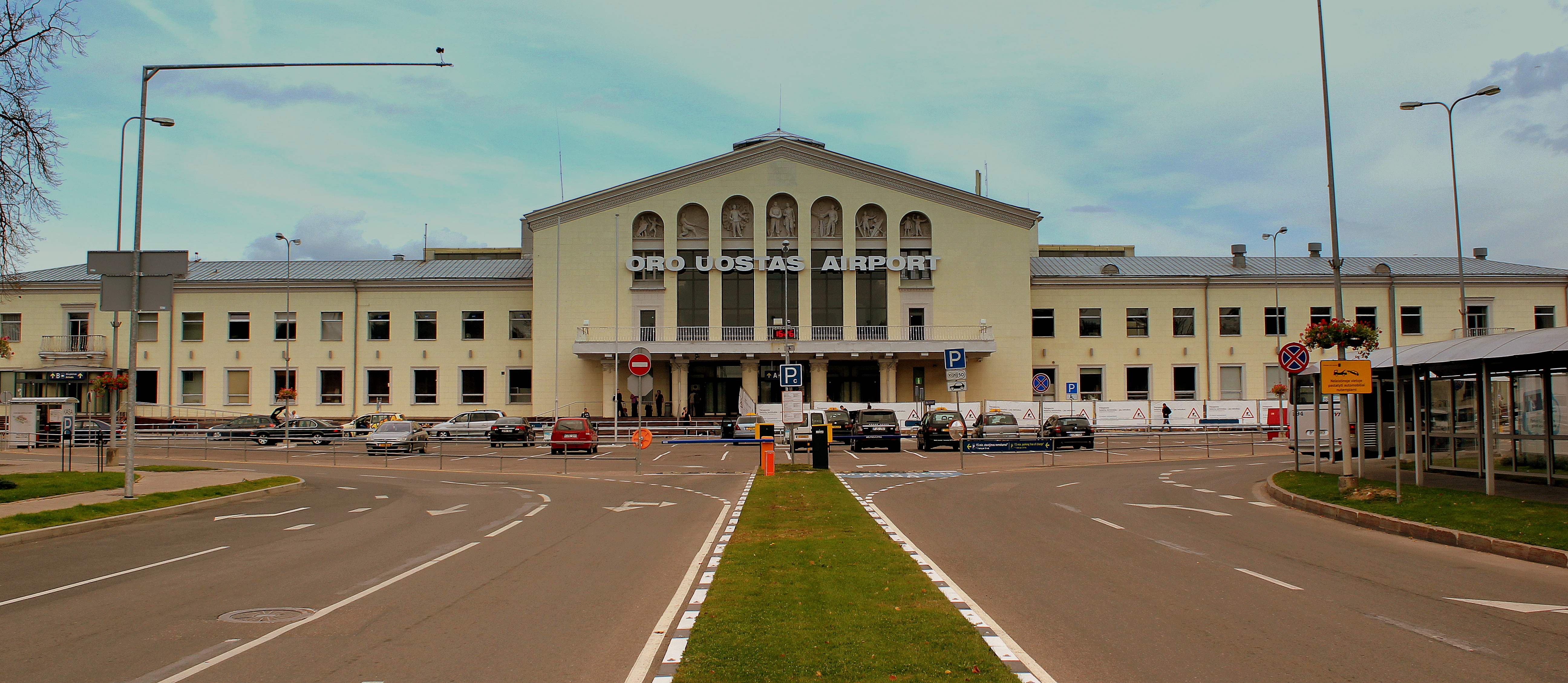 ORO UOSTAS AIRPORT VILLINUS LITHUANIA SEP 2013